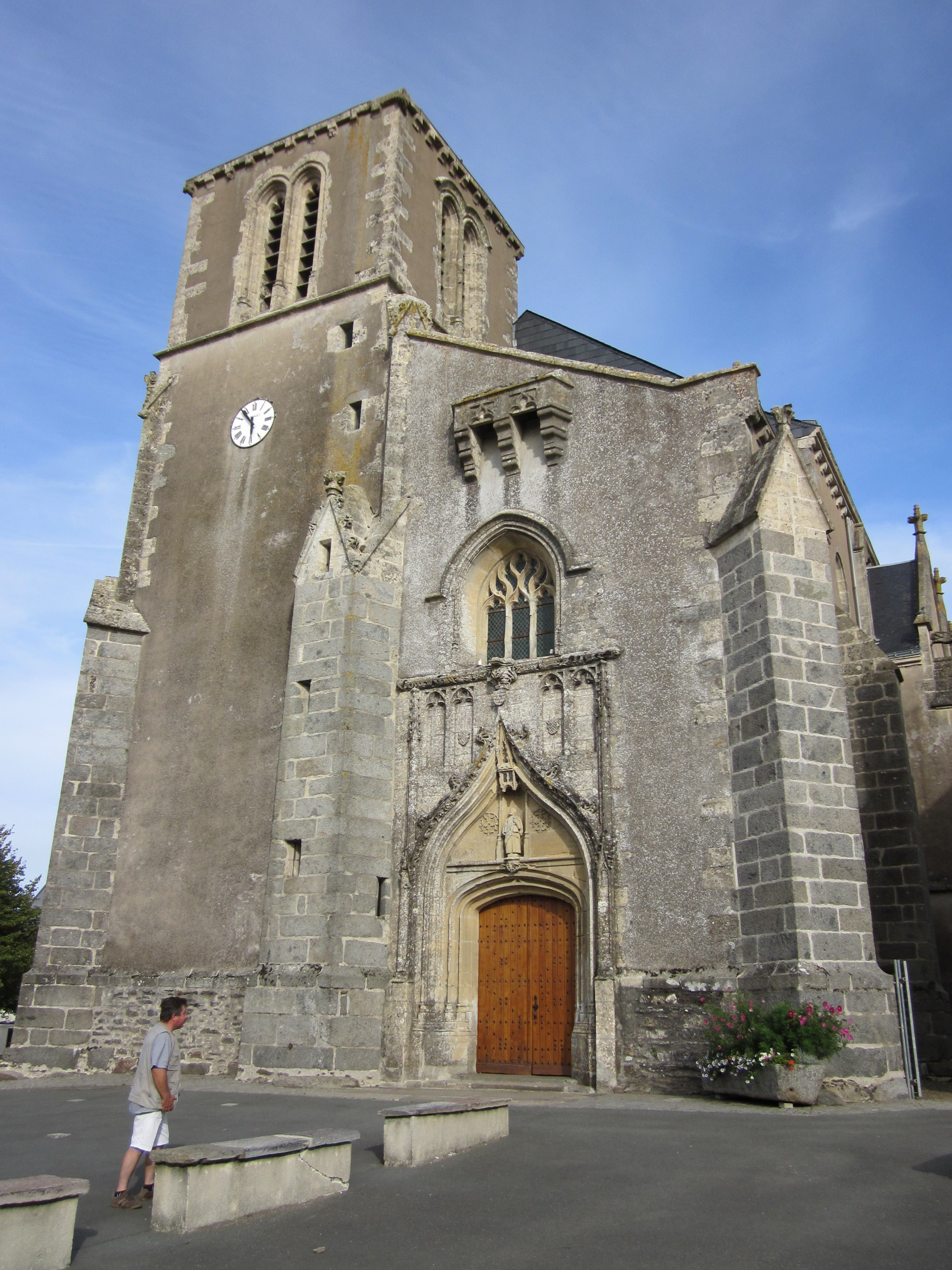 Église Saint-Pierre. Commune de Saint-Pierre-du-Chemin, en Vendée.